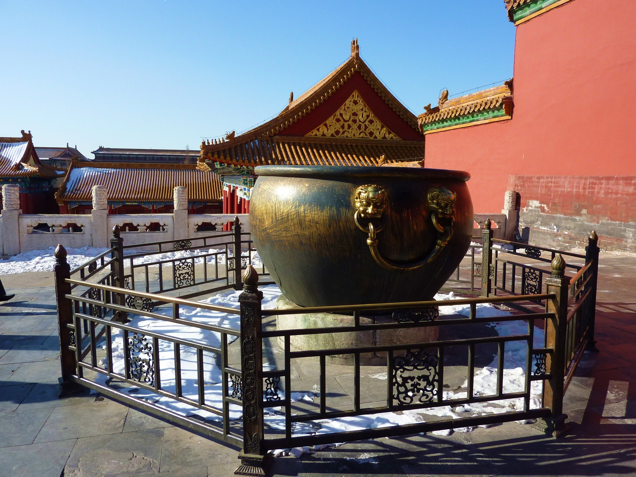 ·˙·ChinaUli2010·.· Beijing - Forbidden Town